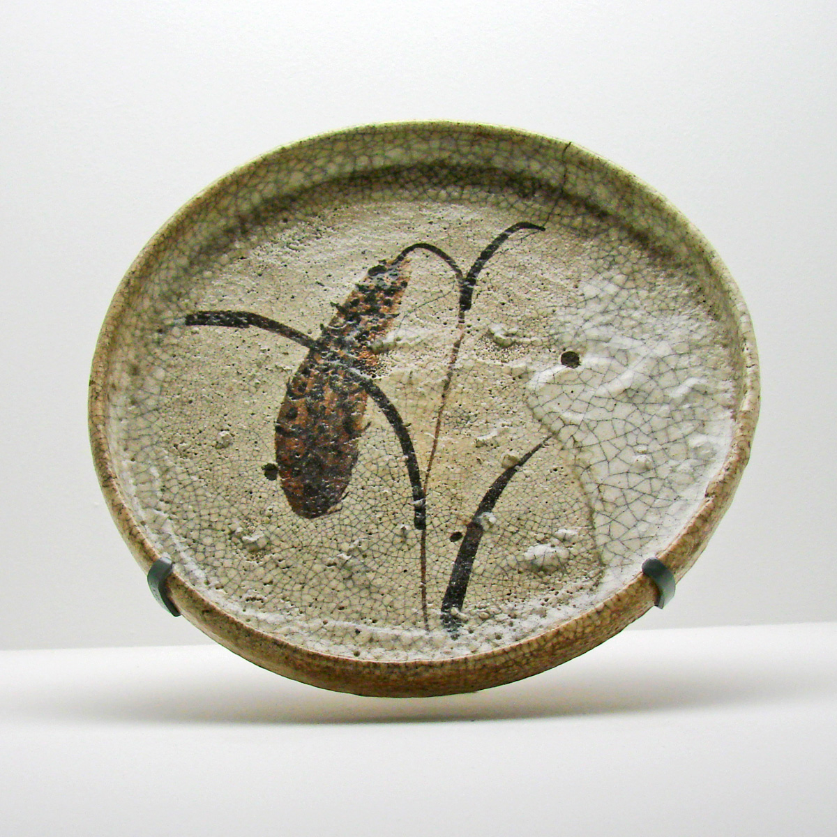 Poterie avec émail à motif d'épi de millet 17ème siècle, Mino, préfecture de Gifu, Japon Nihon Mingeikan, Tokyo Exposition : L’esprit Mingei au Japon : de l’artisanat populaire au design Musée du Quai Branly